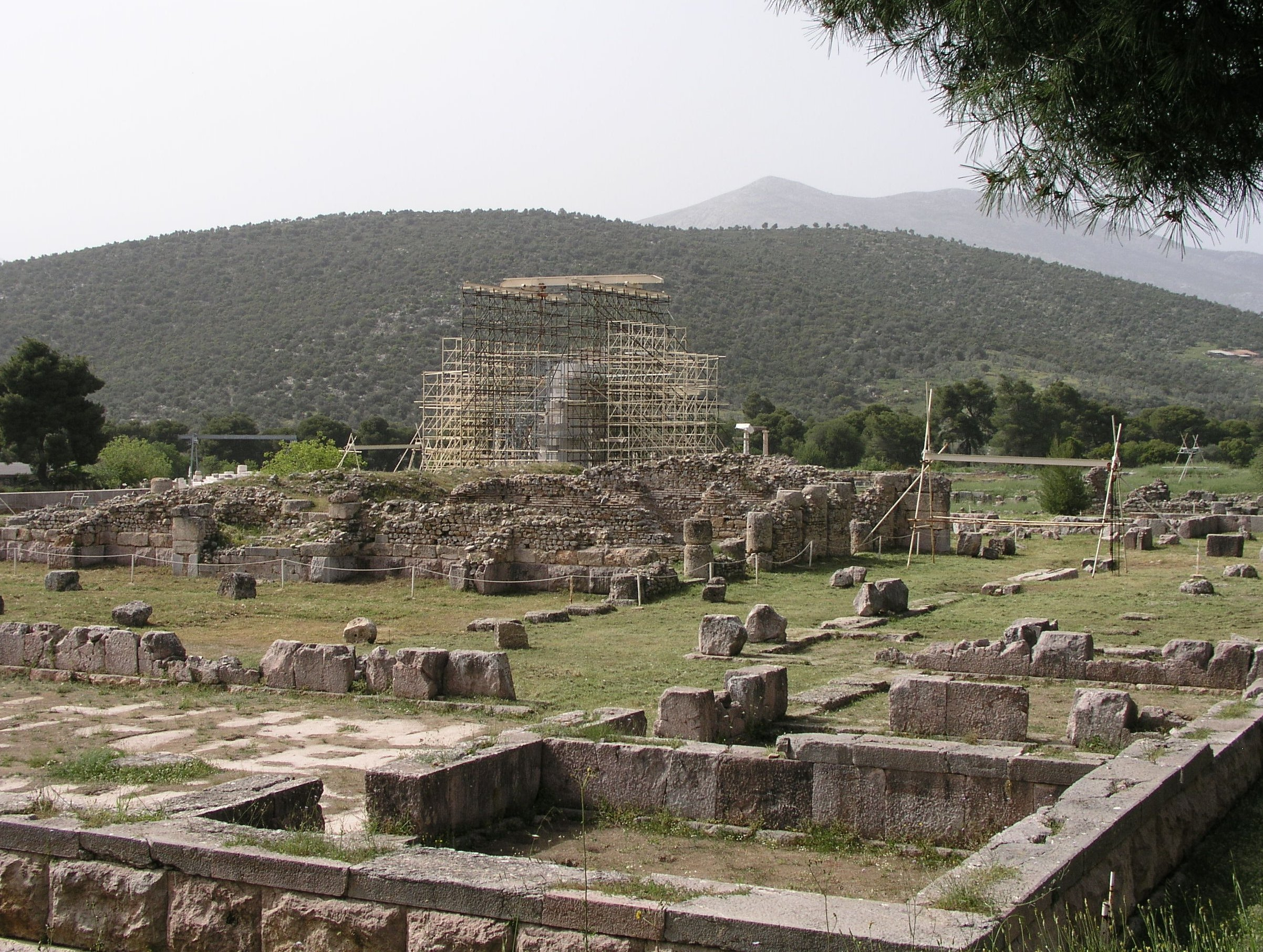 Rekonstruktion des Eingangsbereiches des antiken Gymnasions in Epidauros